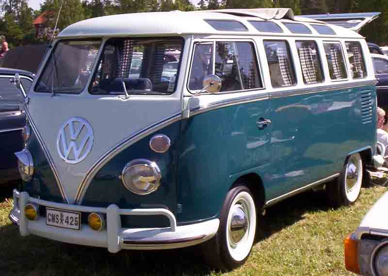 Volkswagen Type 2 Kleinbus 241 1965